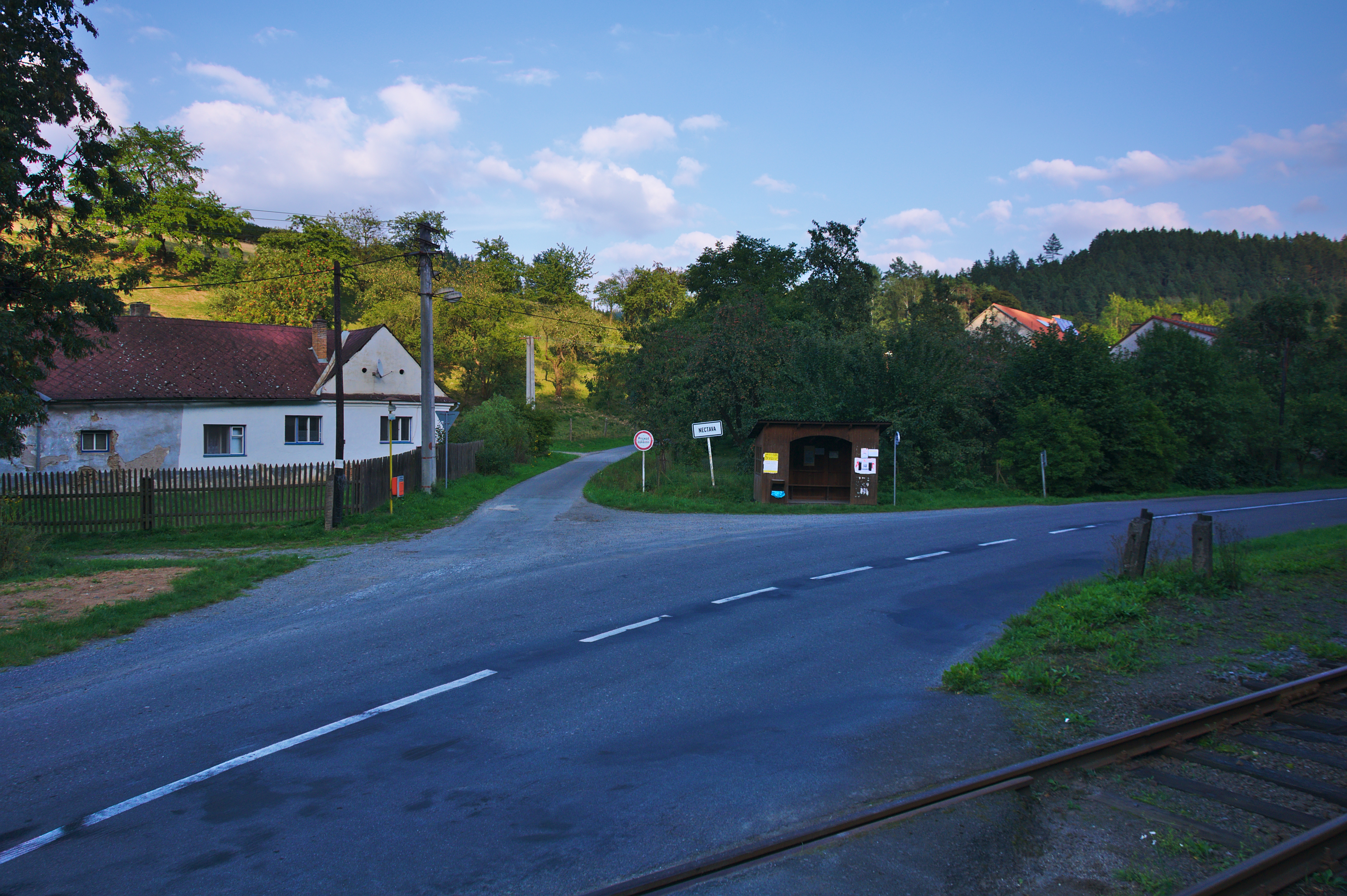 Obec od vlakového přejezdu, Nectava, Březinky, okres Svitavy